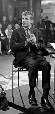 Gerard Reve in Mies en scène